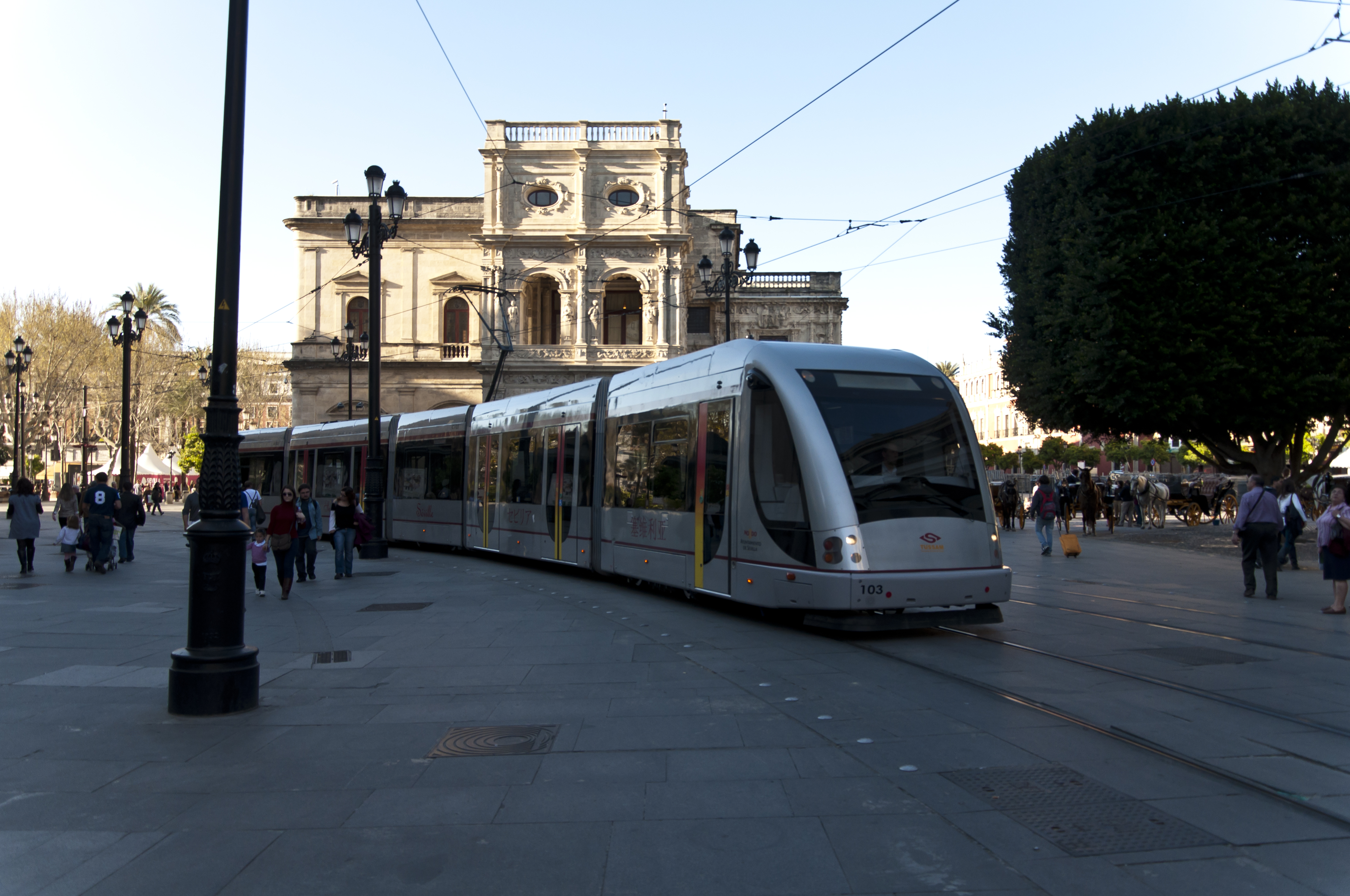 Een tram van de maatschappij TUSSAM in Sevilla als hij de plaza Nueva verlaat en de avenida de la Constitución oprijdt